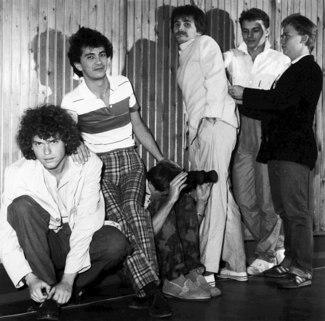 Az Első emelet együttes 1982-ben (balról-jobbra: Tereh István, Cser György, Kisszabó Gábor, Bogdán Csaba, Rausch Ferenc és Berkes Gábor)